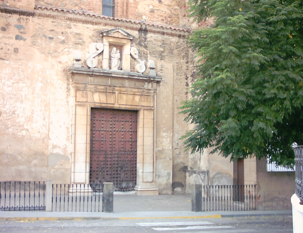 Iglesia Nuestra Señora de la Purificación de Villalba de los Barros (Badajoz)